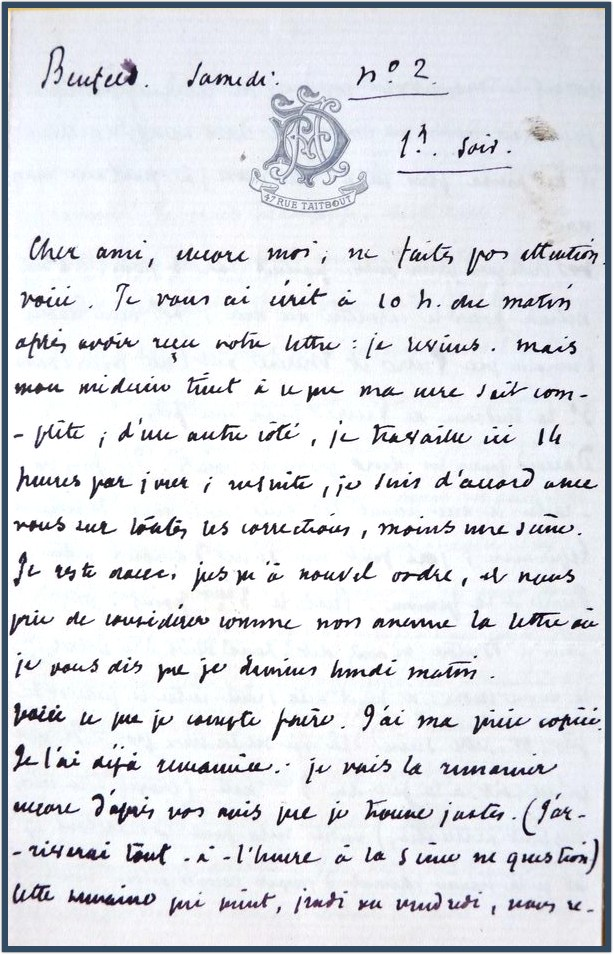 Рукописное письмо Альбера Дельпи (дружеская переписка)